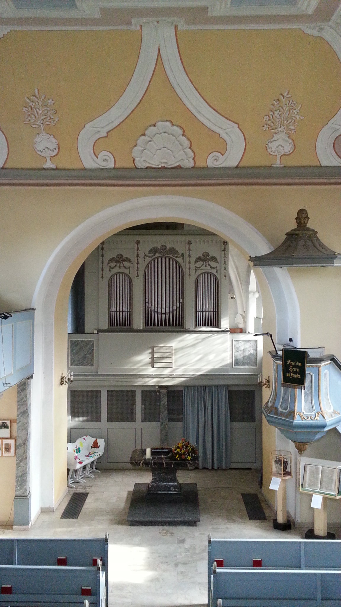 Evangelischen Kirche Bettenhausen, Hessen